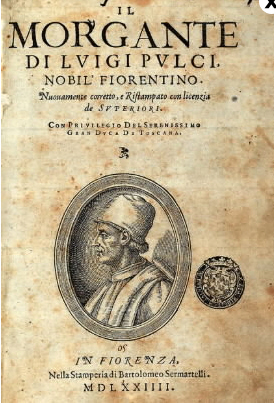 Vydání eposu Morgane od Pulciho z roku 1574